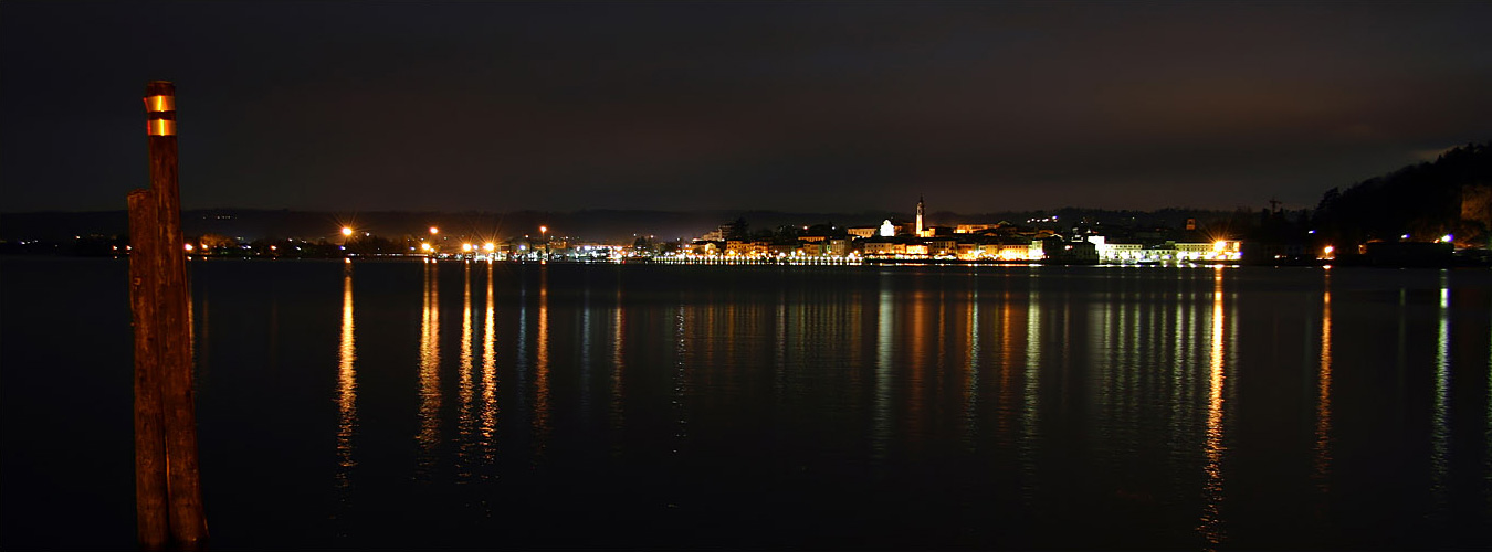 Lungolago notturno di Arona (NO) visto dalla sponda lombarda. foto by Alessandro Vecchi - 2007